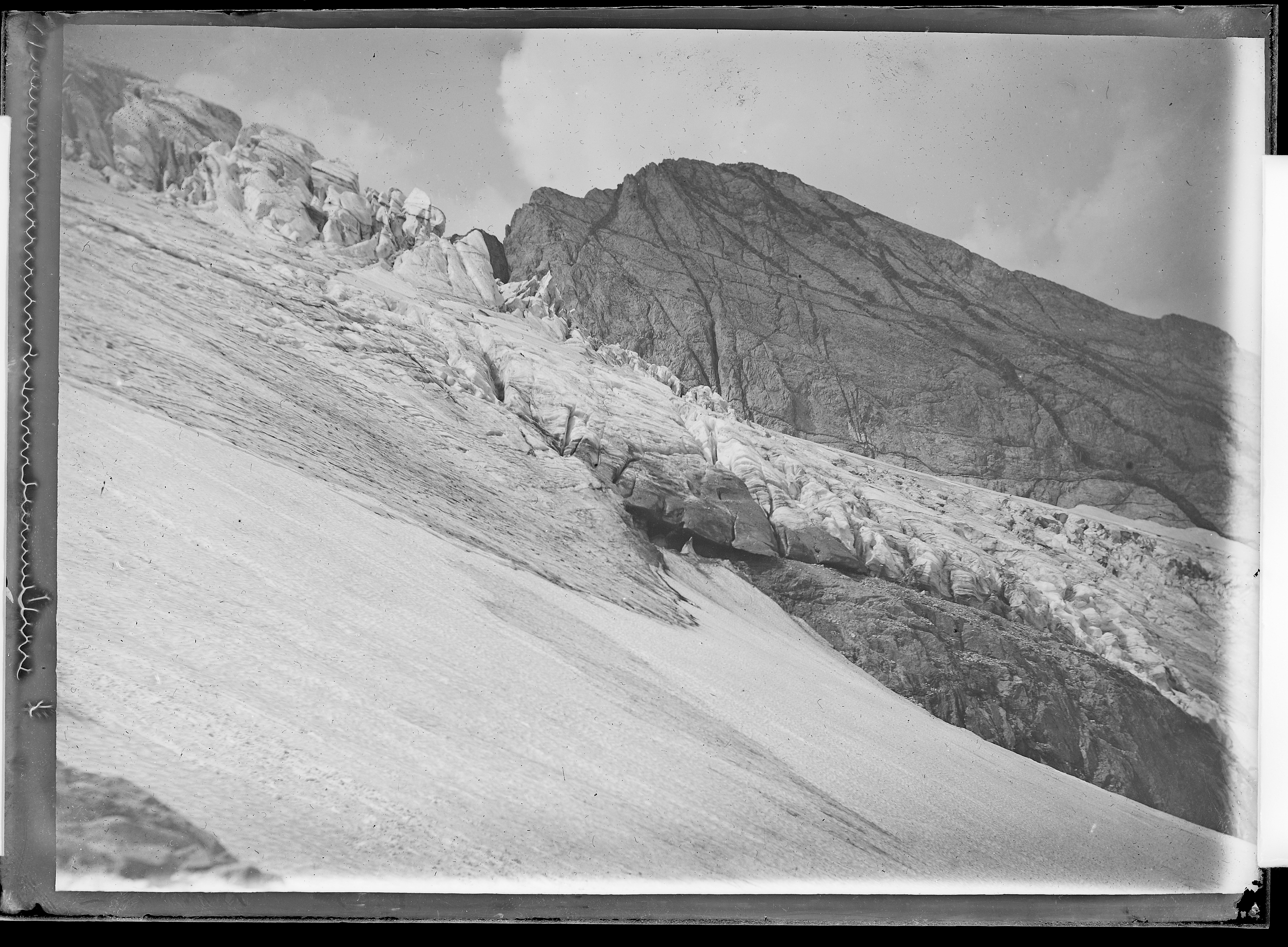 plaque négative au gélatino-bromure d'argent format 13x18cm. Sans inscription ni mention d'auteur.